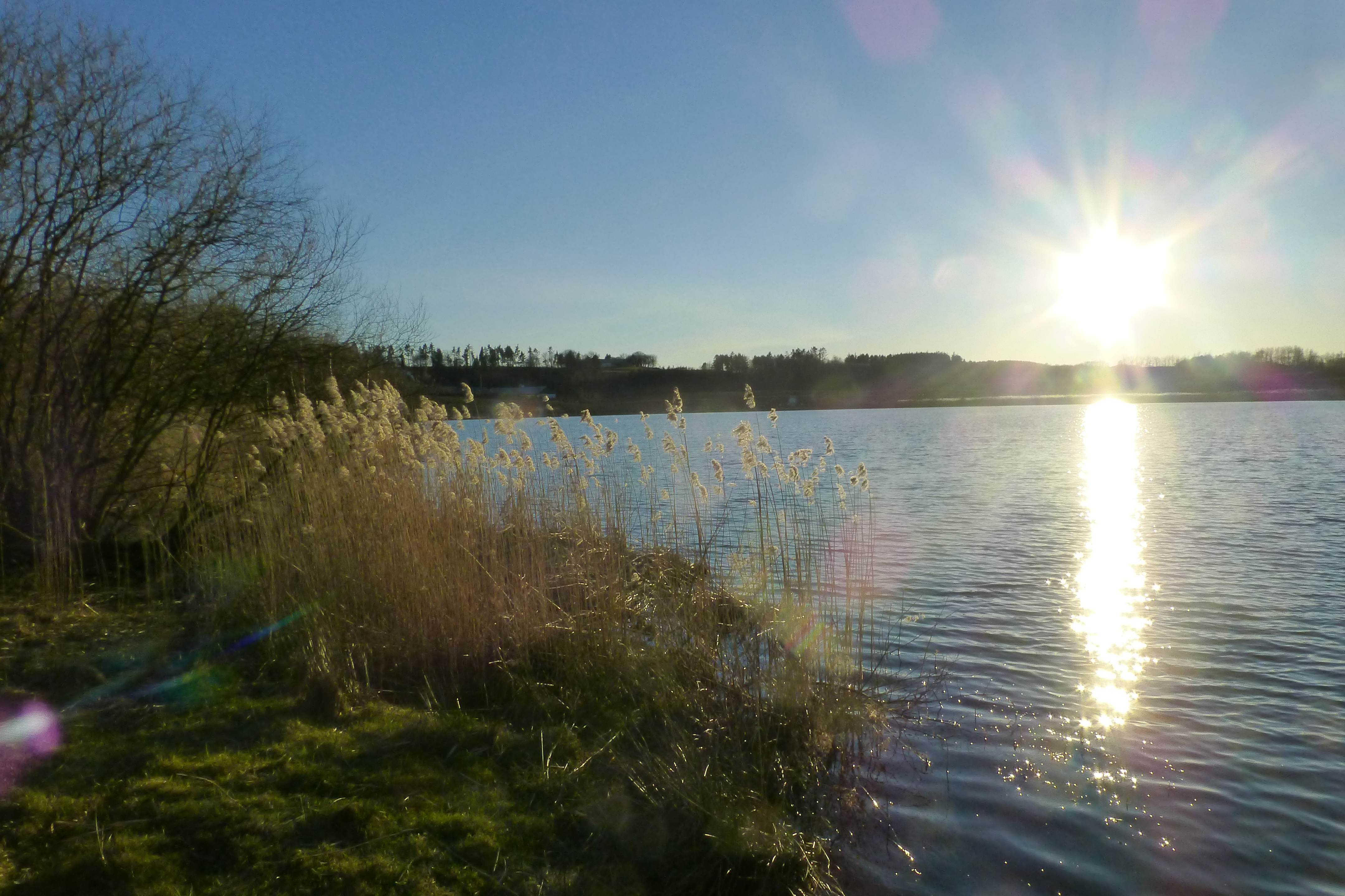 Hummelsø set mod sydvest fra østbredden